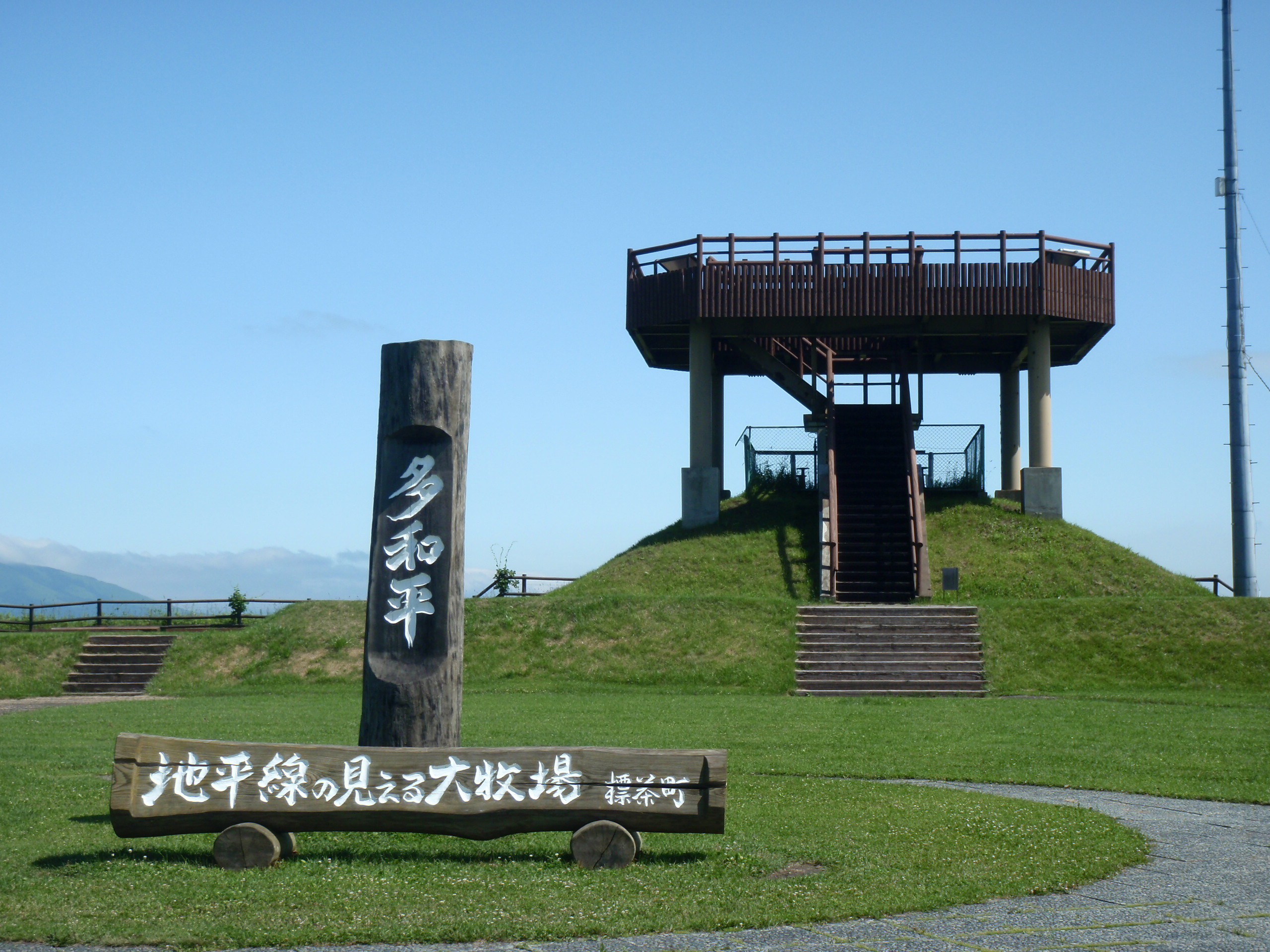 多和平頂上にある展望台